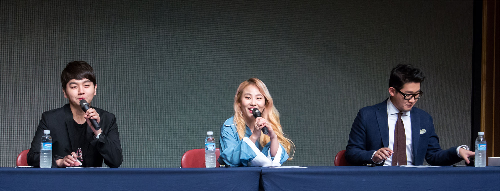 160626 어반자카파 팬싸인회